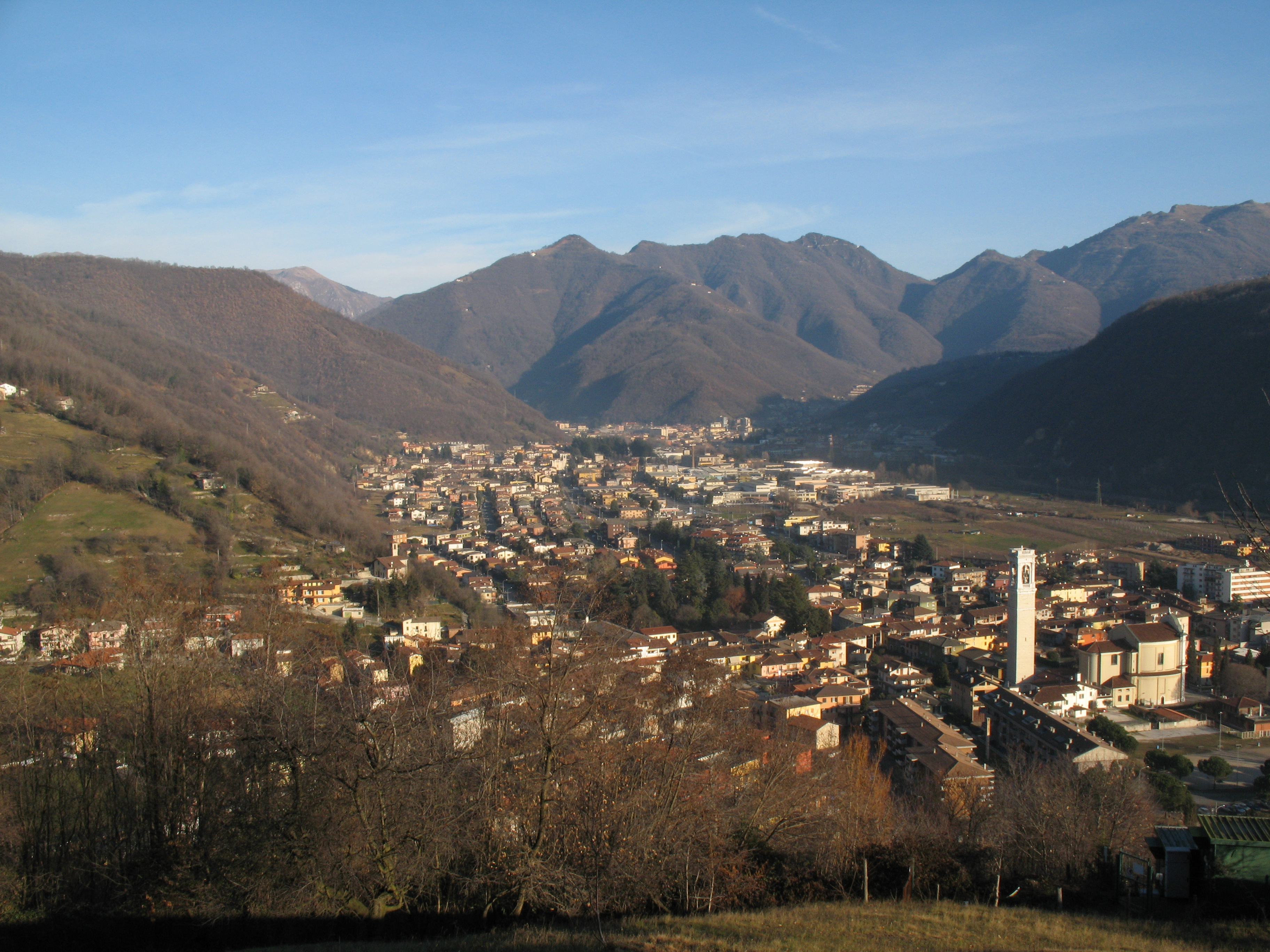 Un panorama del paese